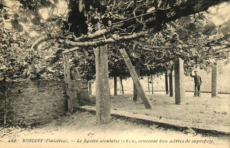 Le figuier de Roscoff vers 1910 (carte postale ND Photo)